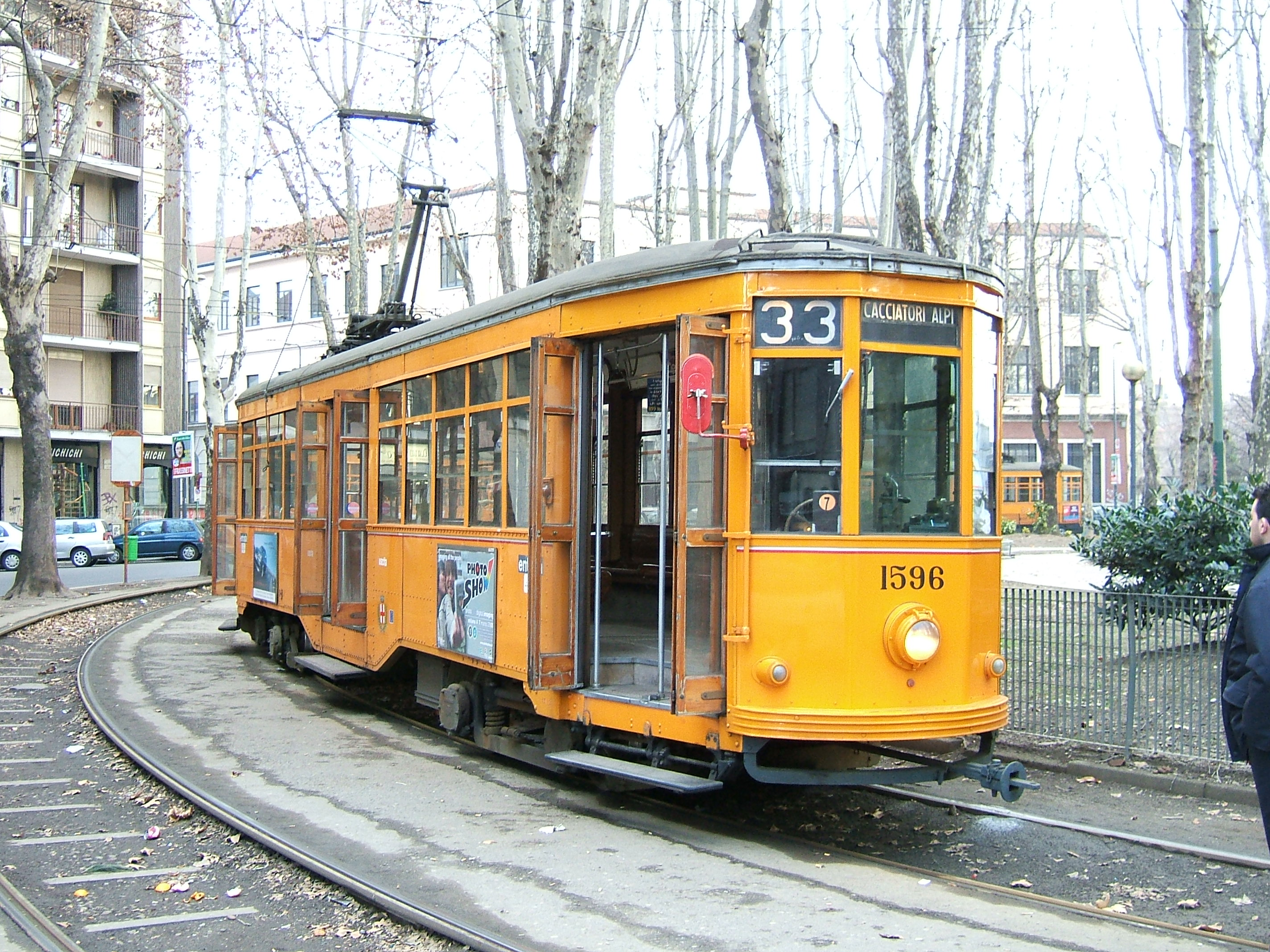 Vettura tranviaria 1596 dell'ATM di Milano in sosta al capolinea di viale Rimembranze di Lambrate